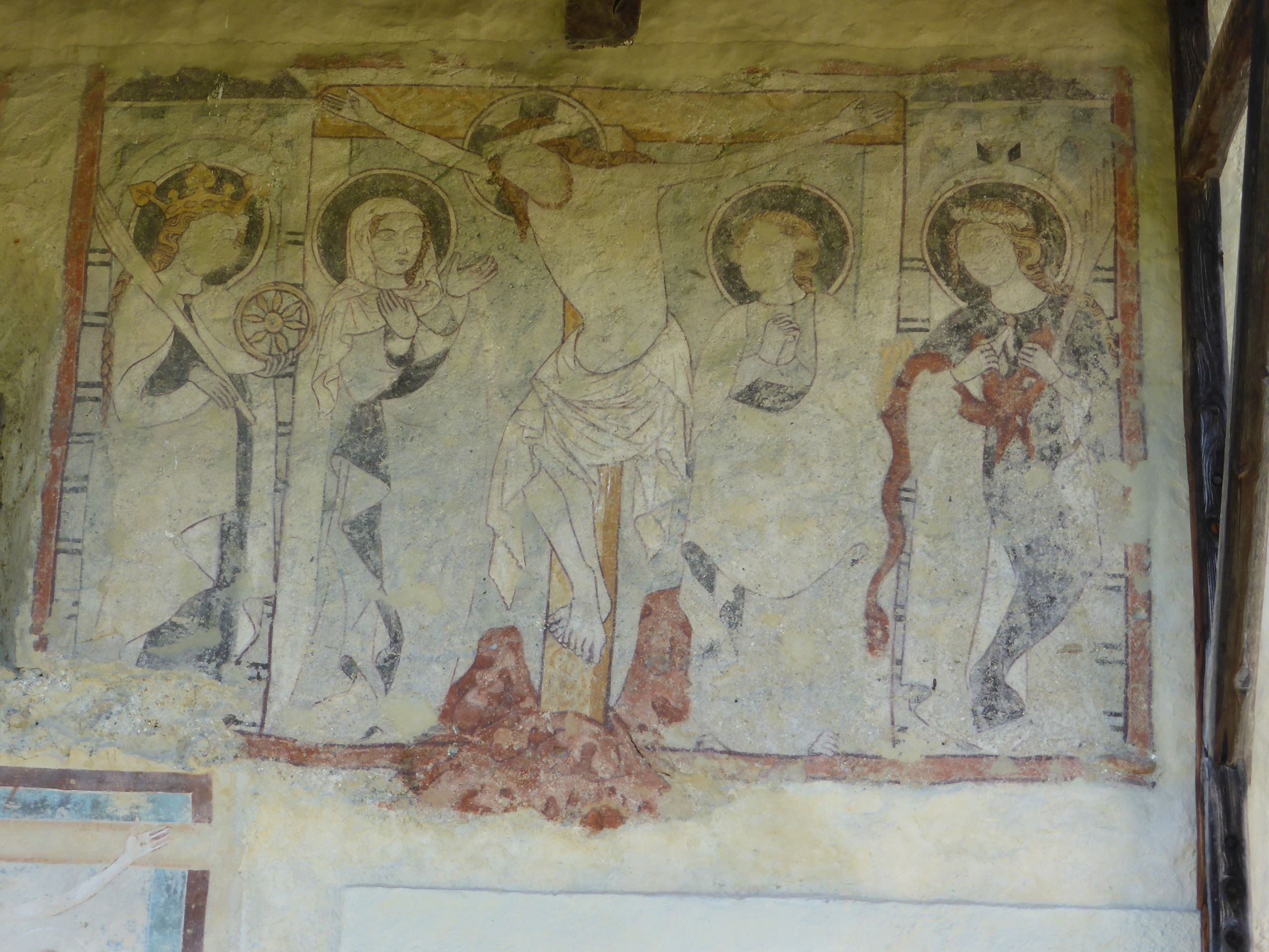 Kath. Filialkirche hll. Primus und Felizian in Buchberg